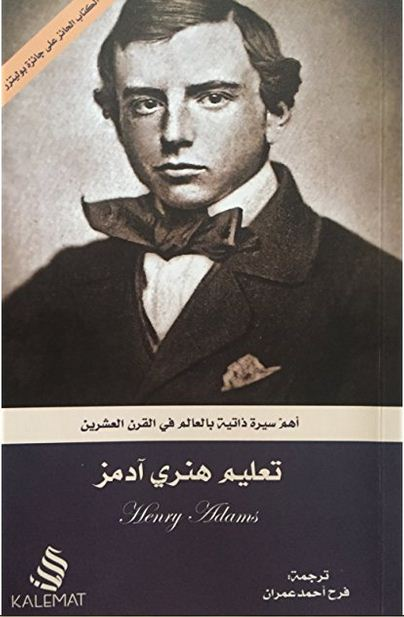 كتاب صادر عن دار كلمات الكويتية عام 2016